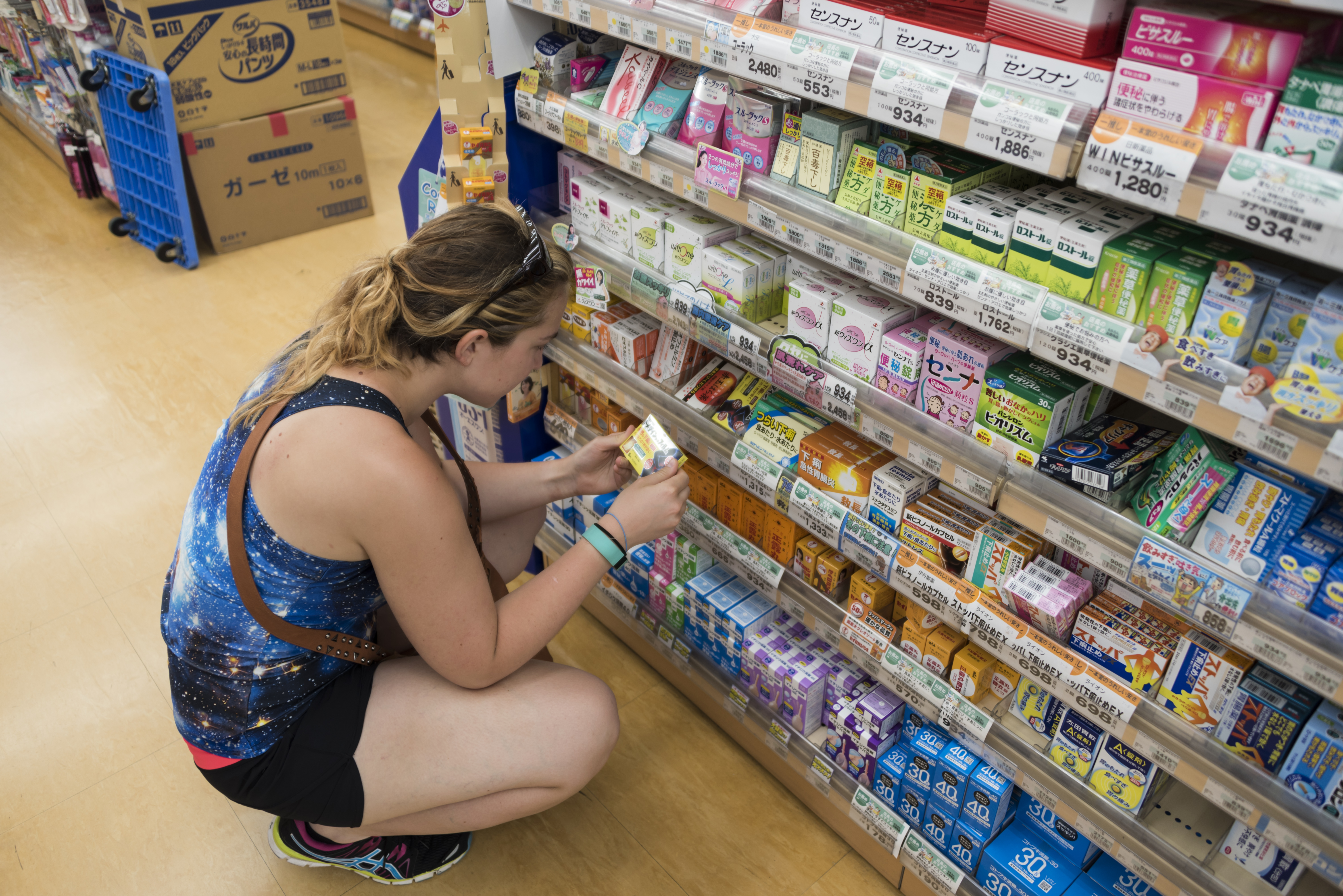 _DSC0248